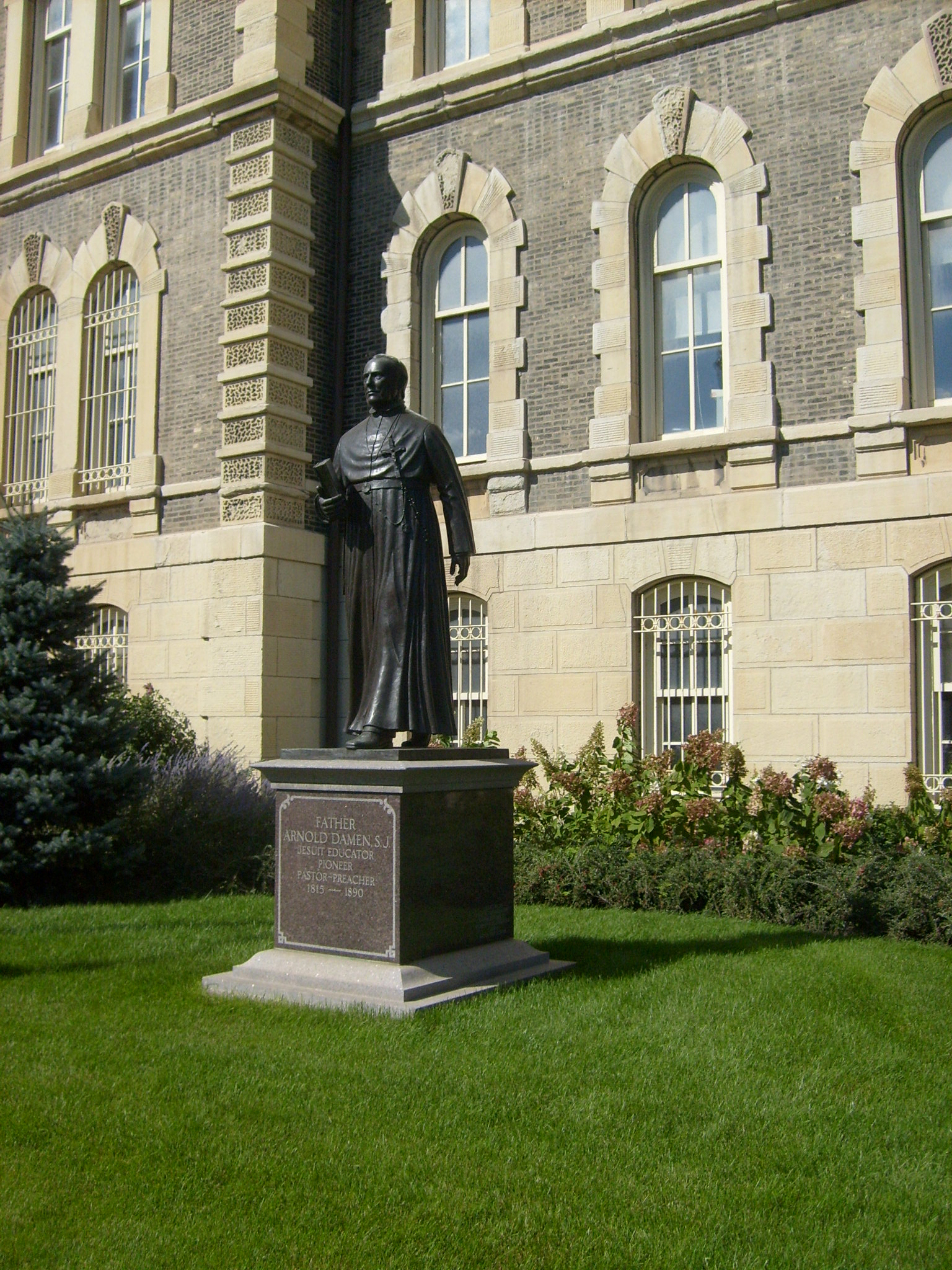 Памятник Арнольду Дамену, основателю церкви Святого семейства в Чикаго